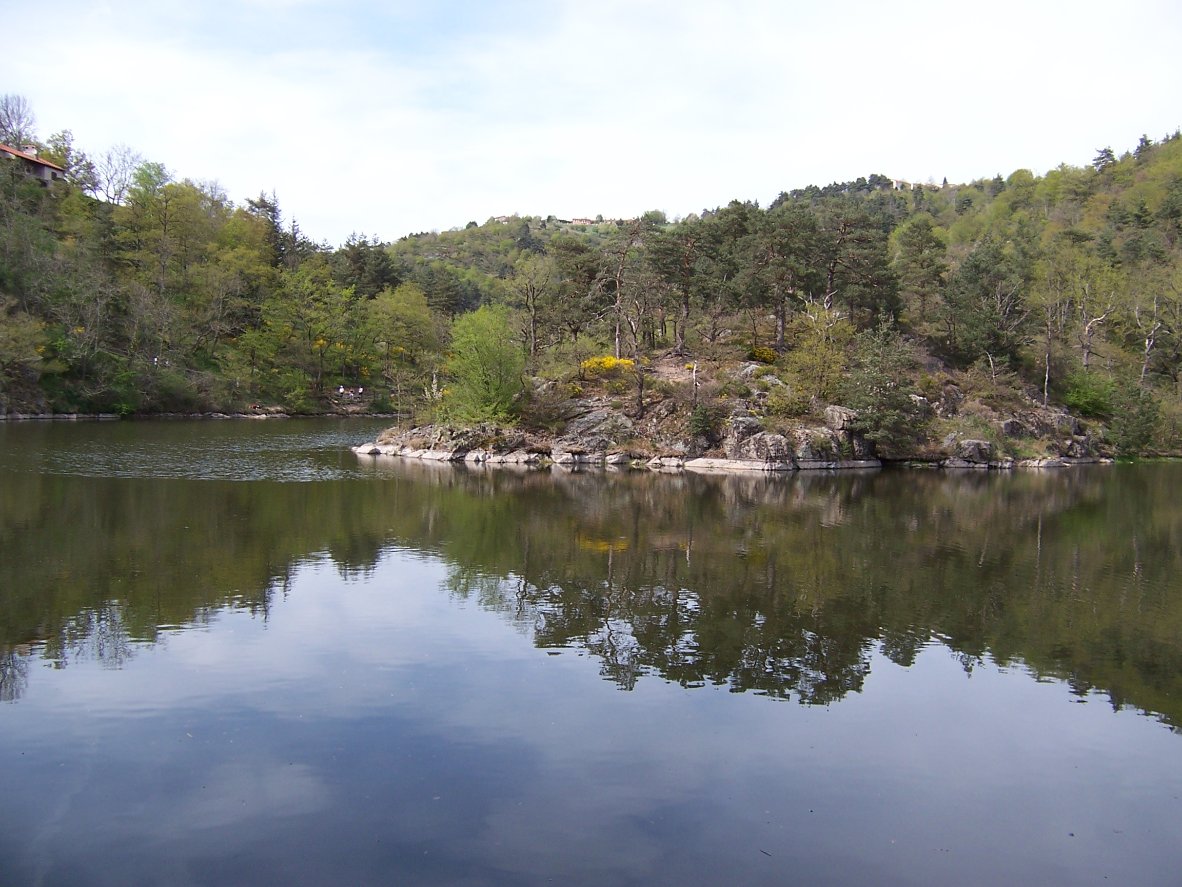 Lac de Grangent prés de Saint Victor